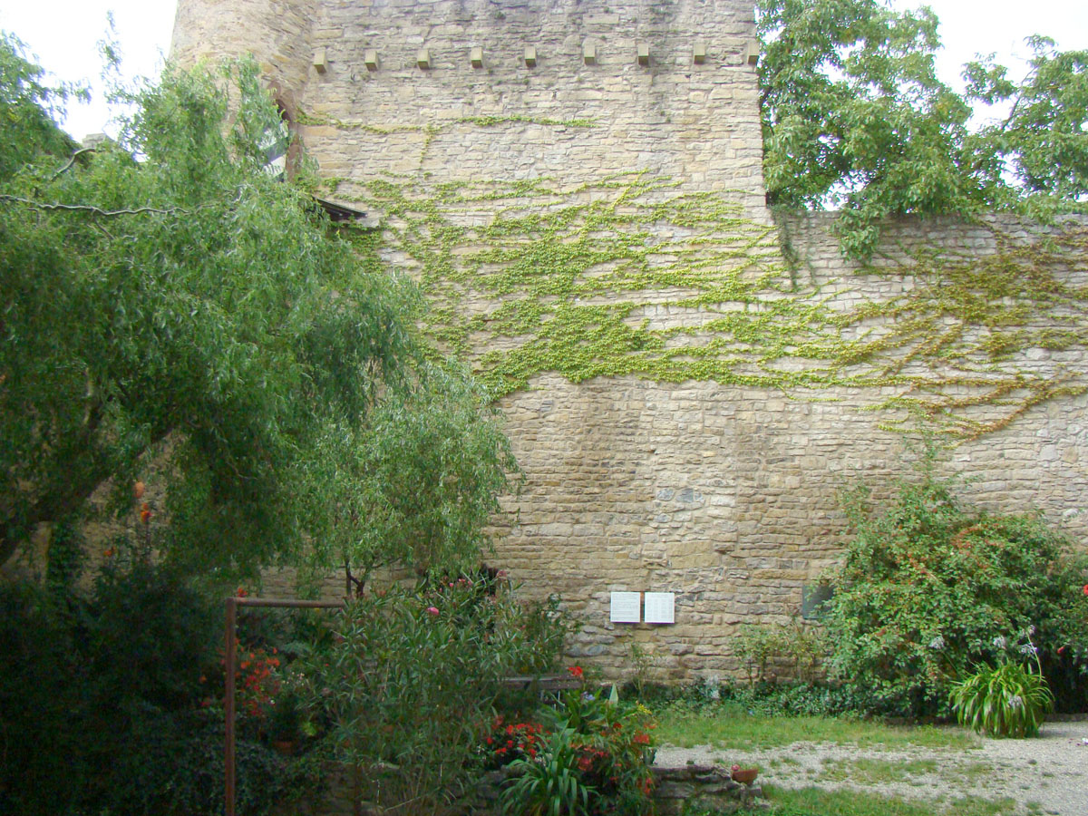 Stelle der früheren Synagoge im Oberschloss Talheim